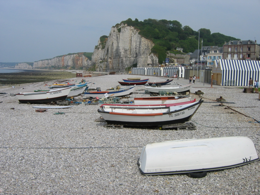 Yport, vu vers Fécamp (nord)